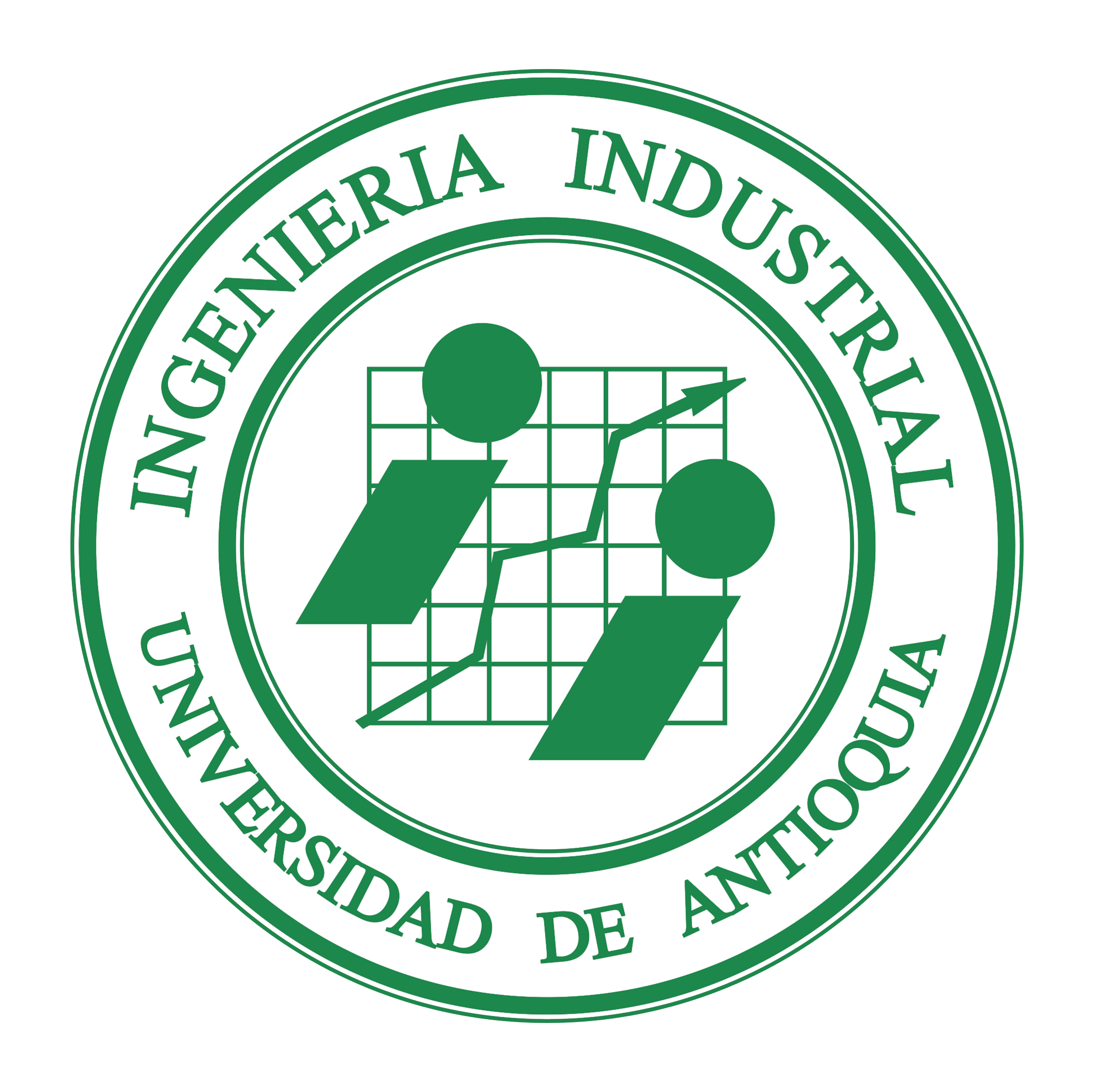 Escudo